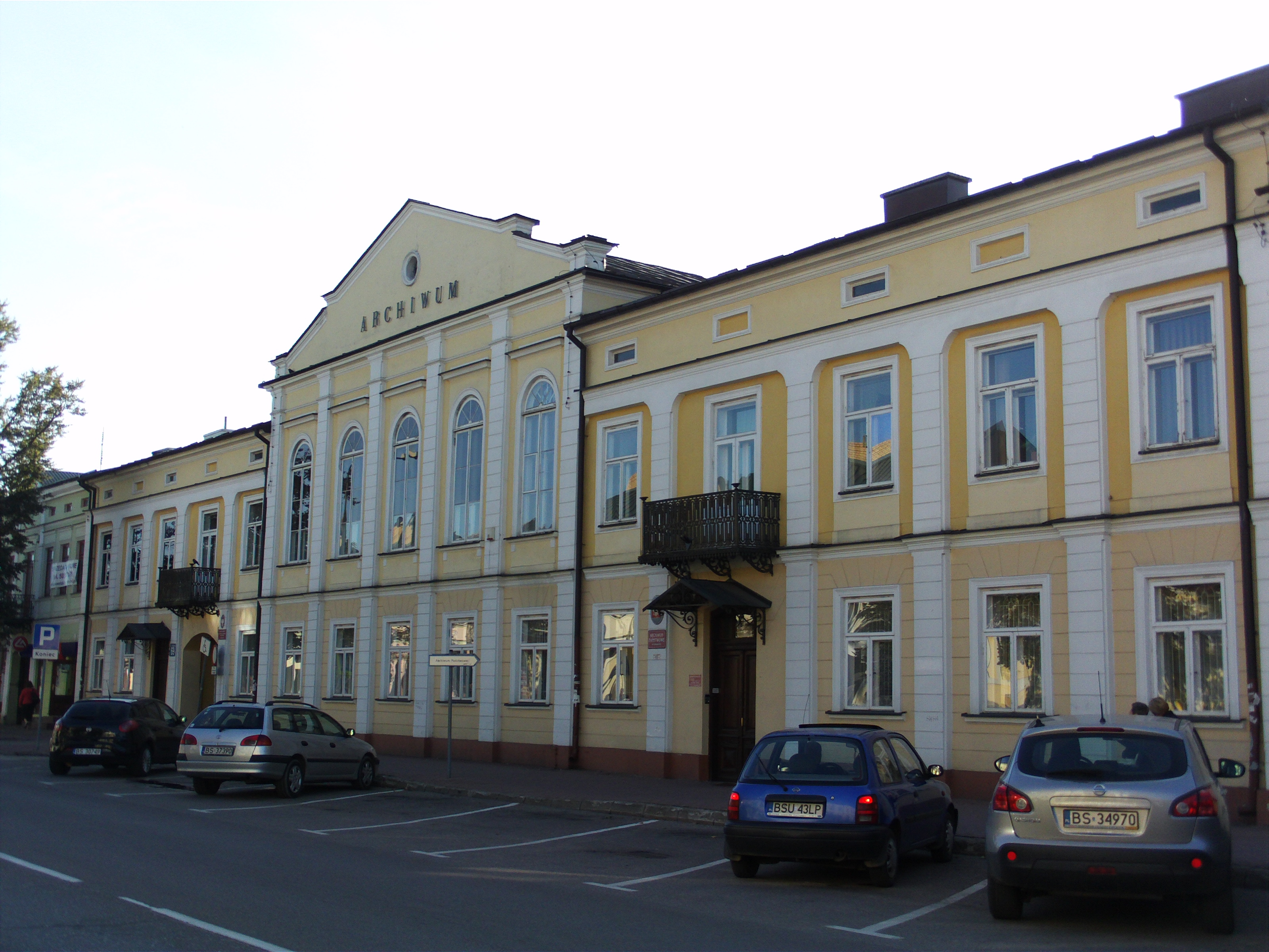 Suwałki ul. Kościuszki 69